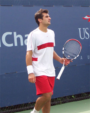 Self Made